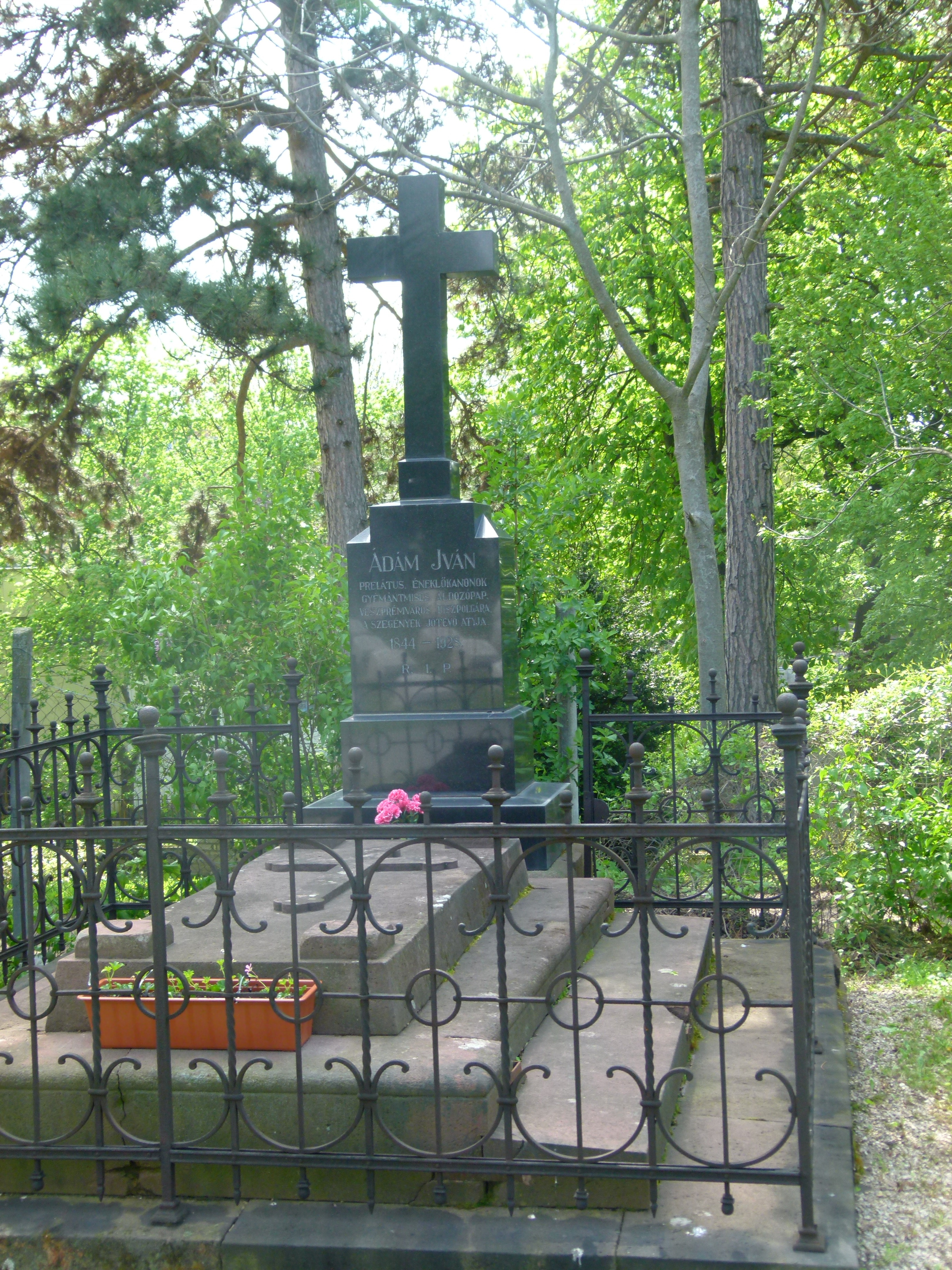 Ádám Iván (1844-1928), prelátus, kanonok, tanár sírja, Alsóvárosi temető, Veszprém